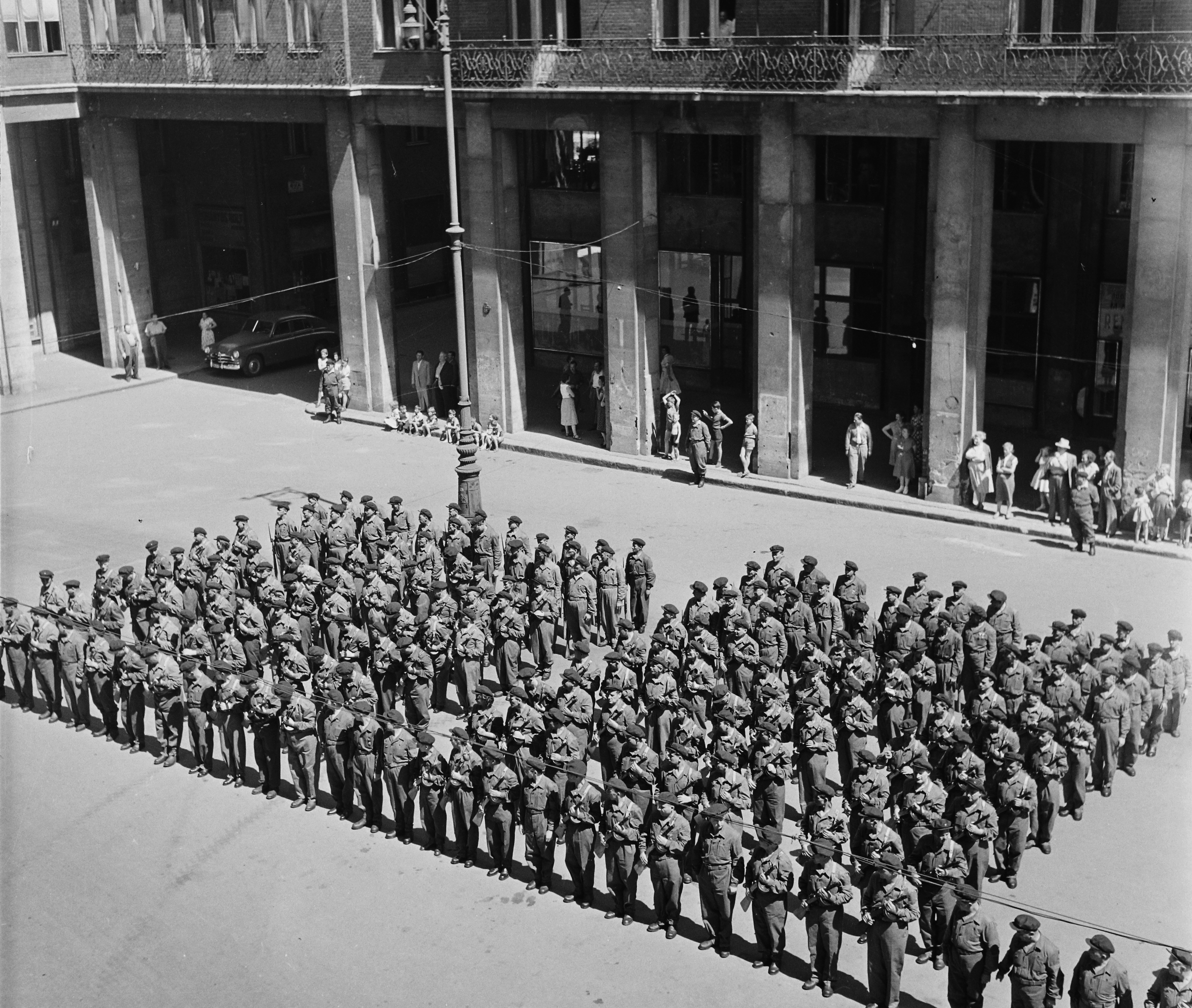 MAGYARORSZÁG BUDAPEST VII. Madách Imre tér. A VII. kerületi munkásőrség zászlóavató ün­nepsége.